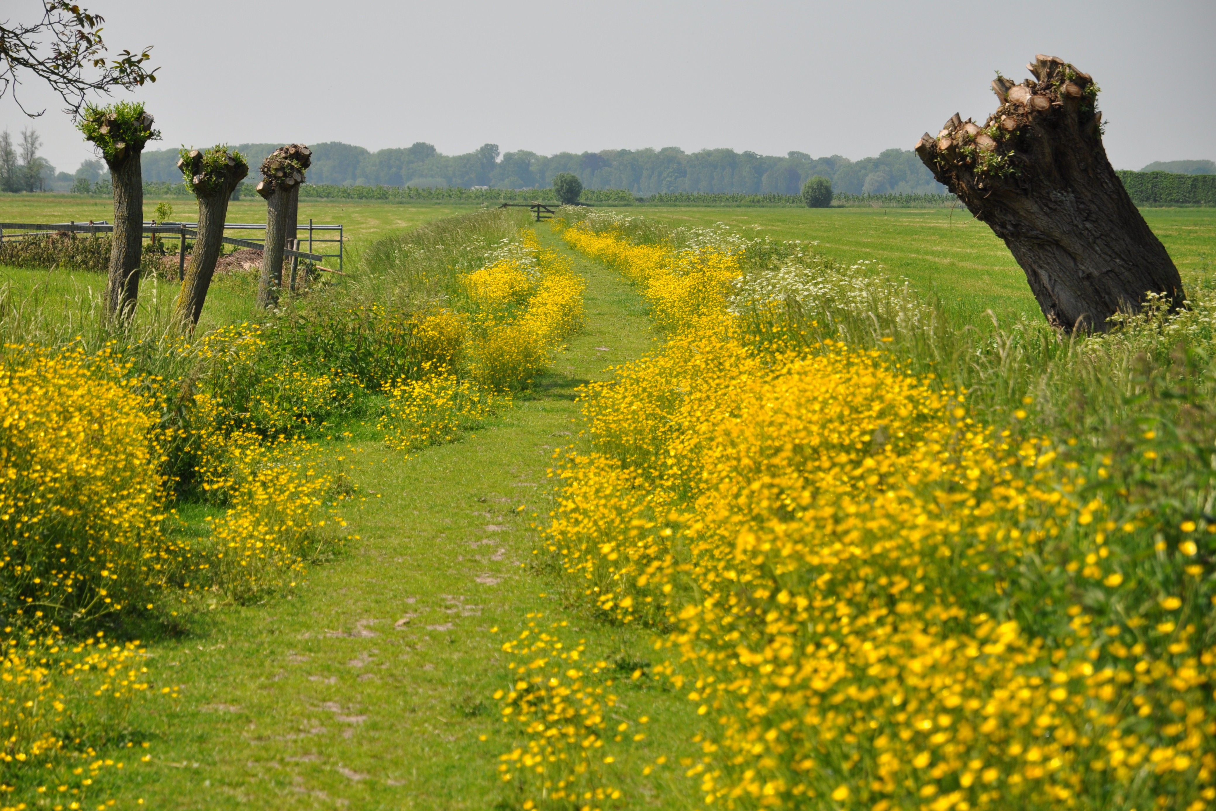 Zicht richting Woerden, vanaf de Waardsedijk in Montfoort.